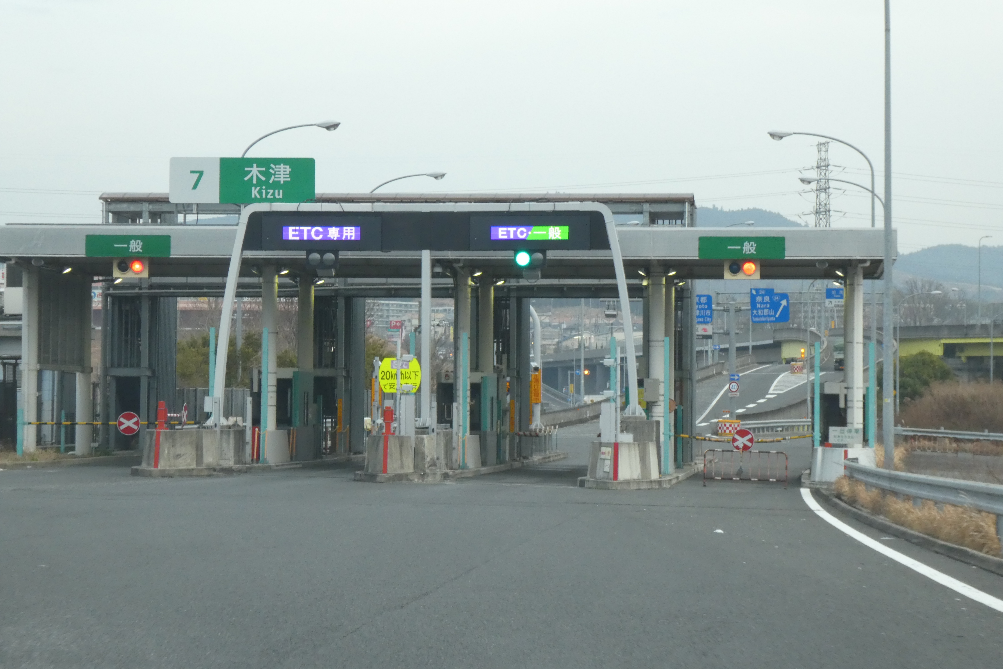 京奈和自動車道 木津インターチェンジ